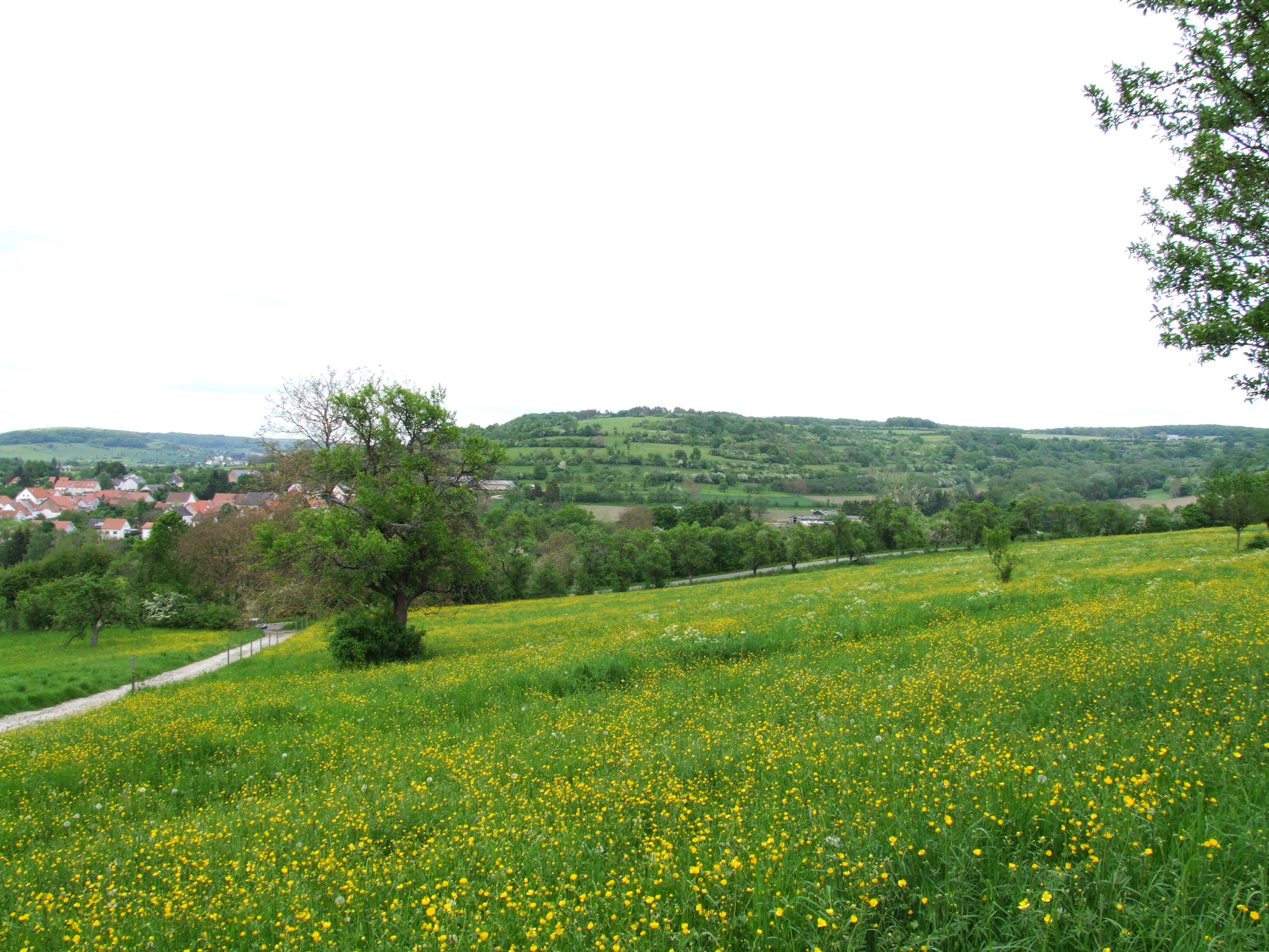 Wiese auf Buchenbüsch mit Blick auf den Sperrberg, links im Bild Niedergailbach, Standort über der Straße nach Obergailbach